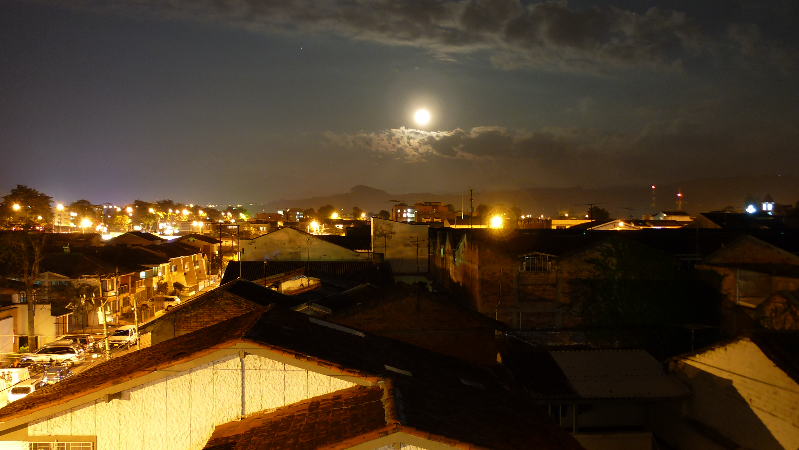 Popayán ceilings at night